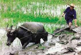 Reisanbau, traditionelles Pflügen des Reisfelds